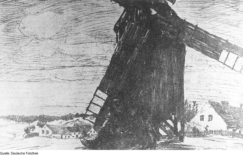 Original image description from the Deutsche Fotothek Gröden. Windmühle, Ausschnitt aus: Bild von H. Nadler, Gröden, aus: Heimatkalender Bad Liebenwerda